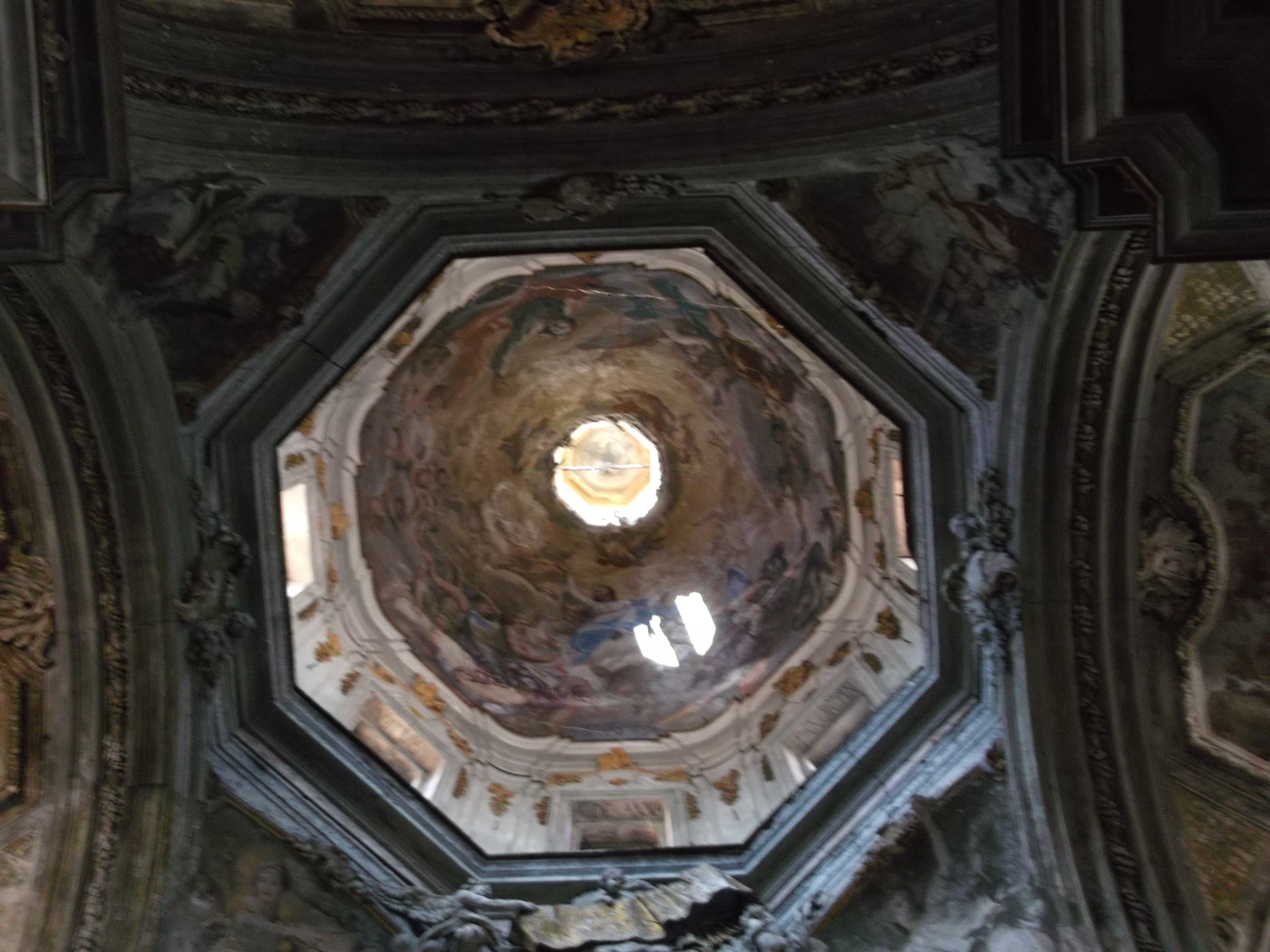 Palermo. San Matteo al Cassaro - cupola2